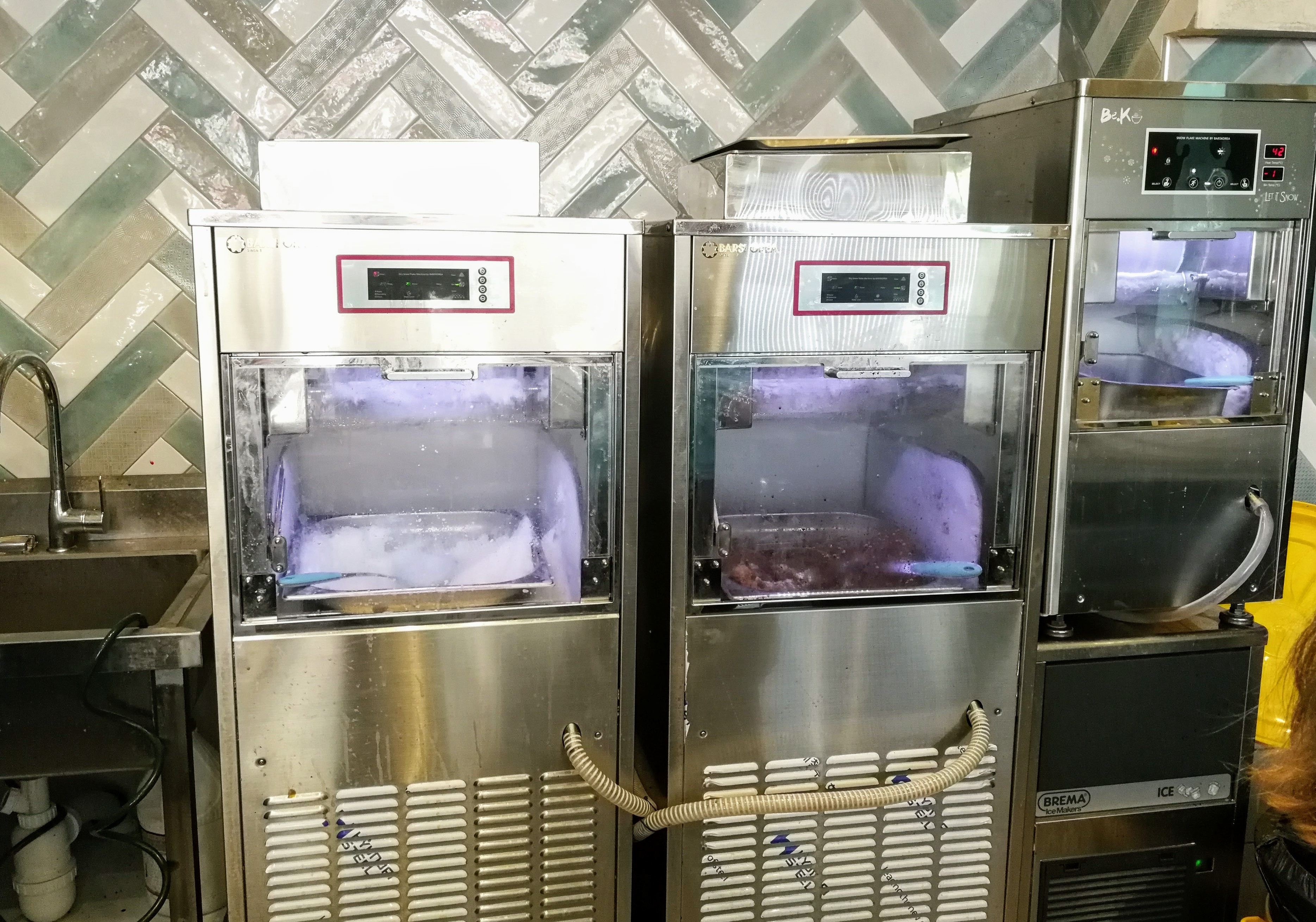 מכונות להכנת בינג סו